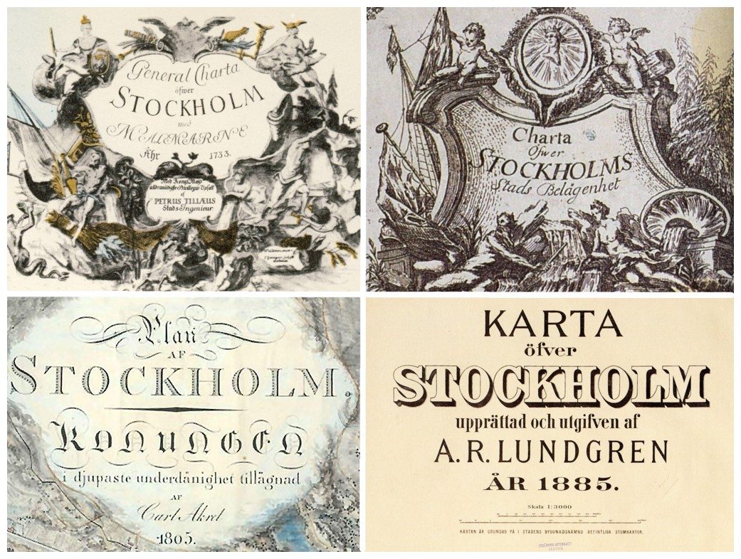 Vinjetter till Stockholmskartor